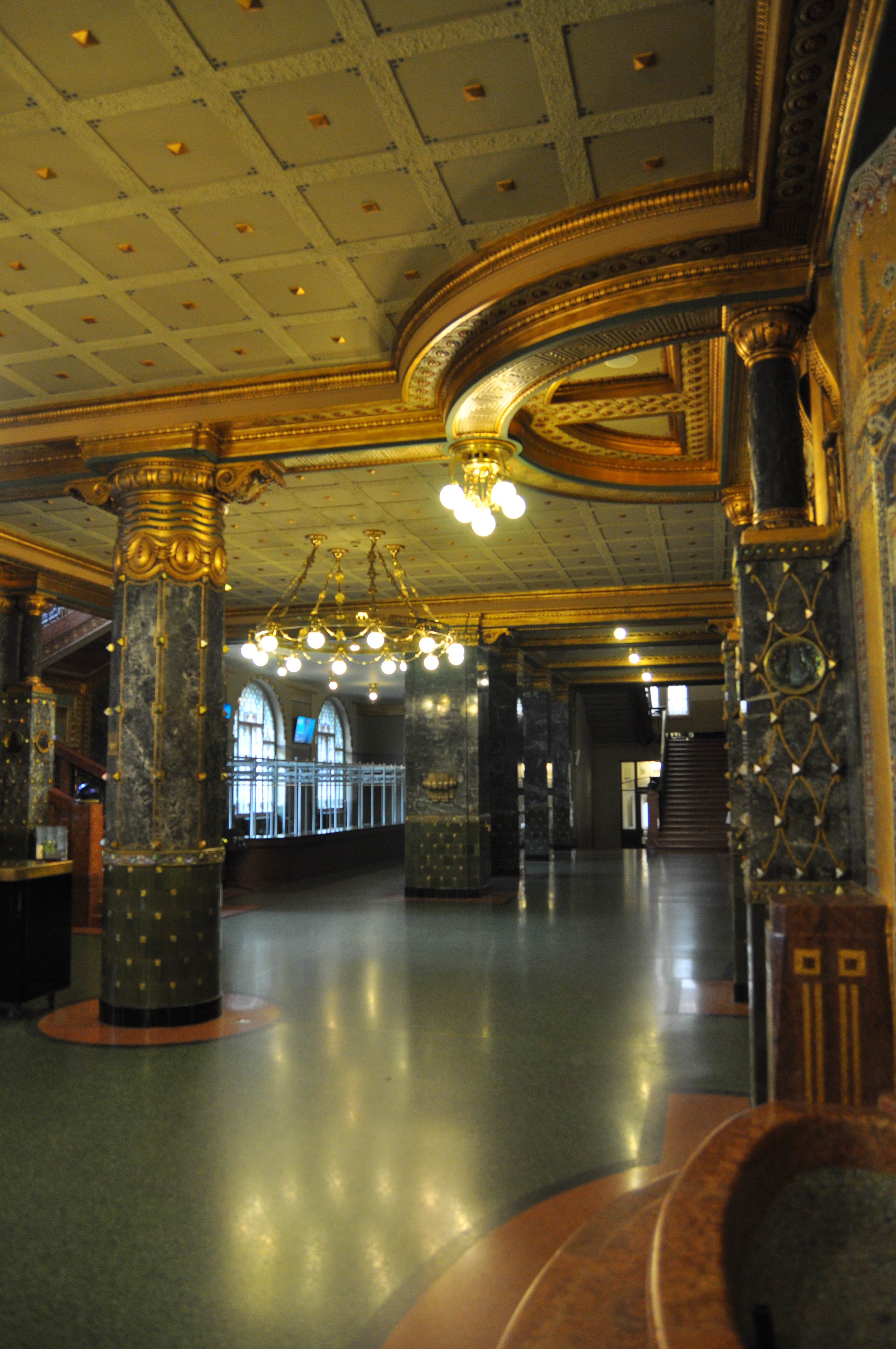 Budapest, Zeneakadémia